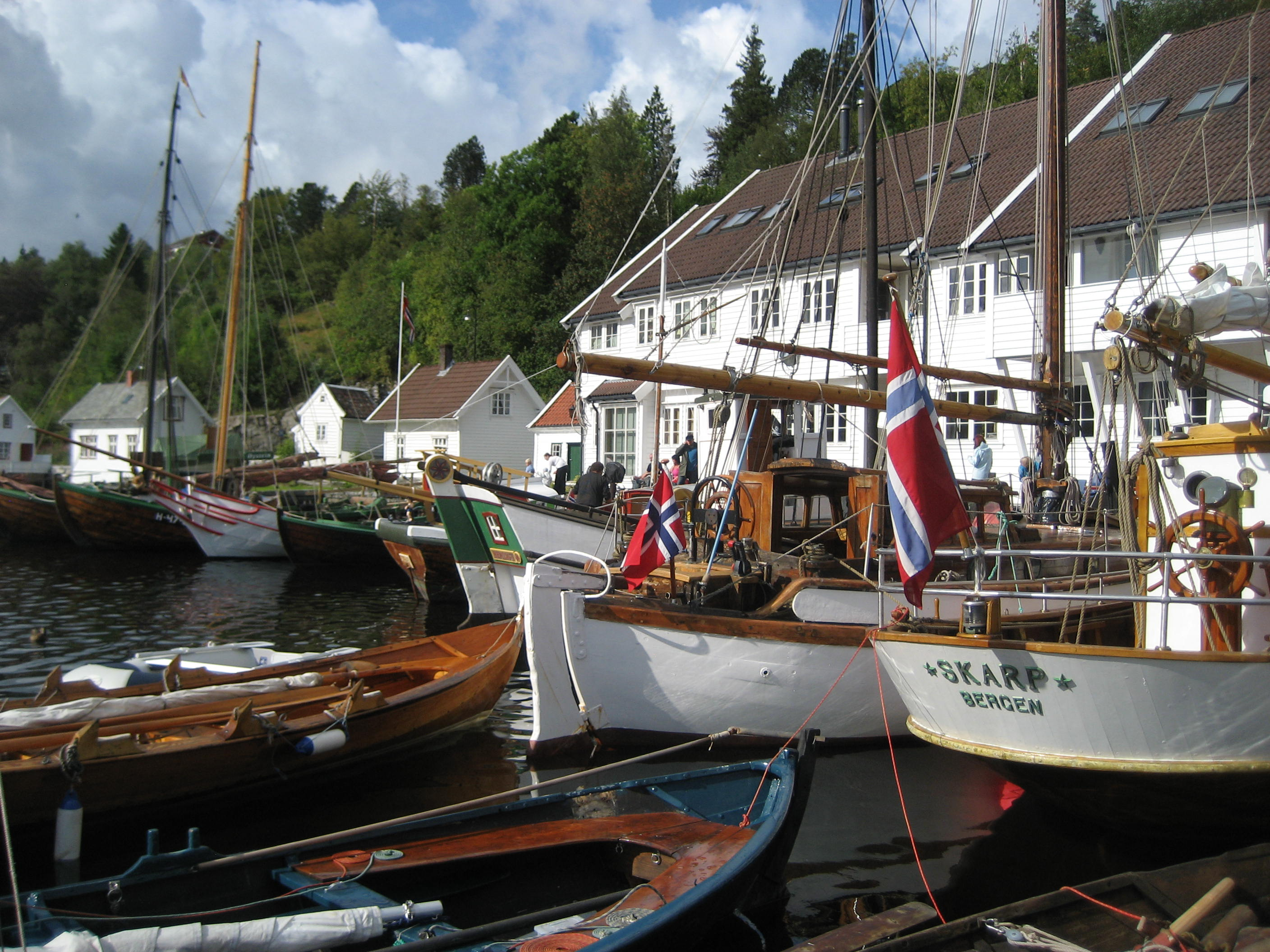 Bilde fra Hordakysstemne 2009